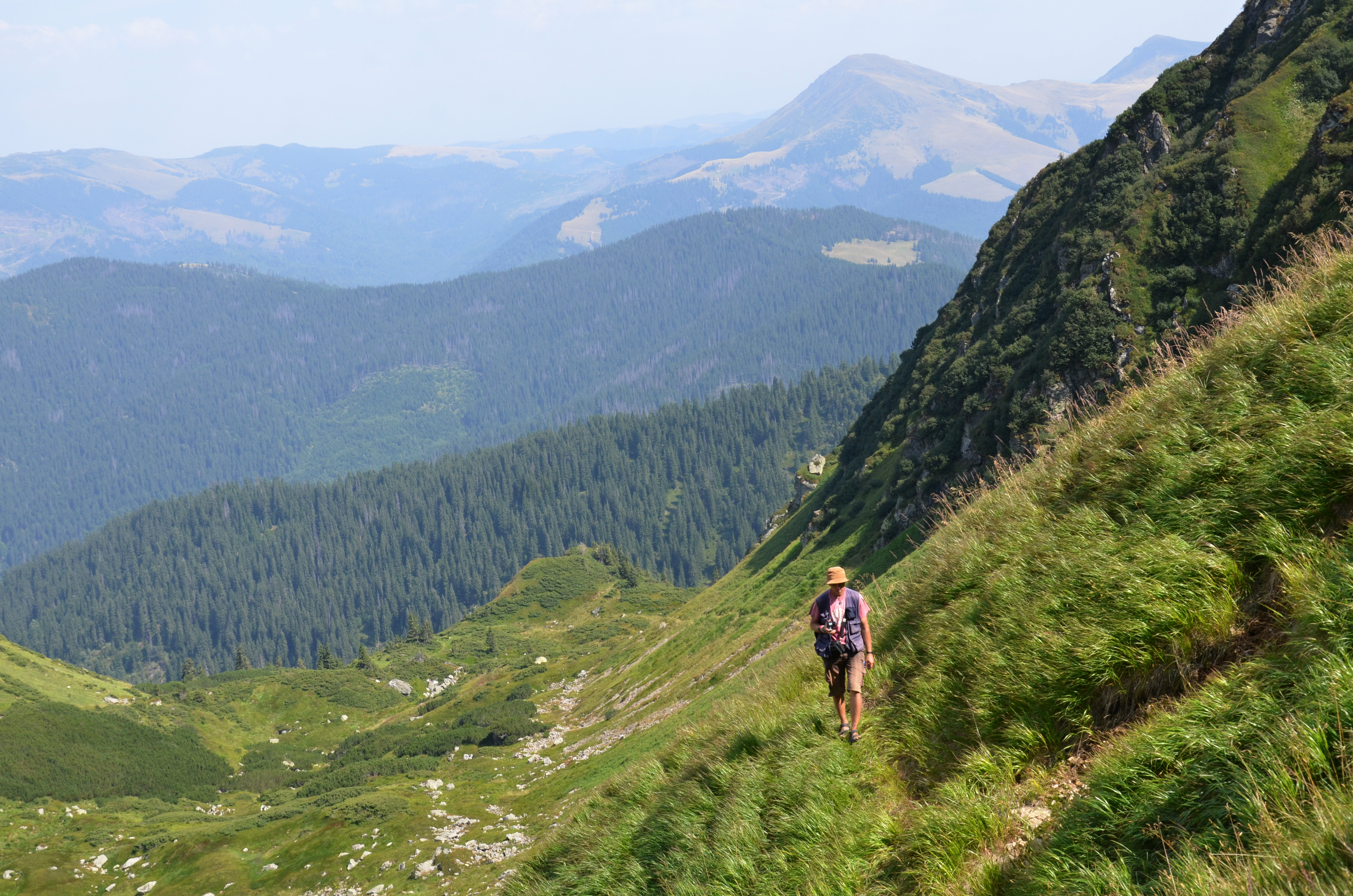 Карпатський біосферний заповідник, Рахівський, Тячівський, Хустський, Виноградівський райони